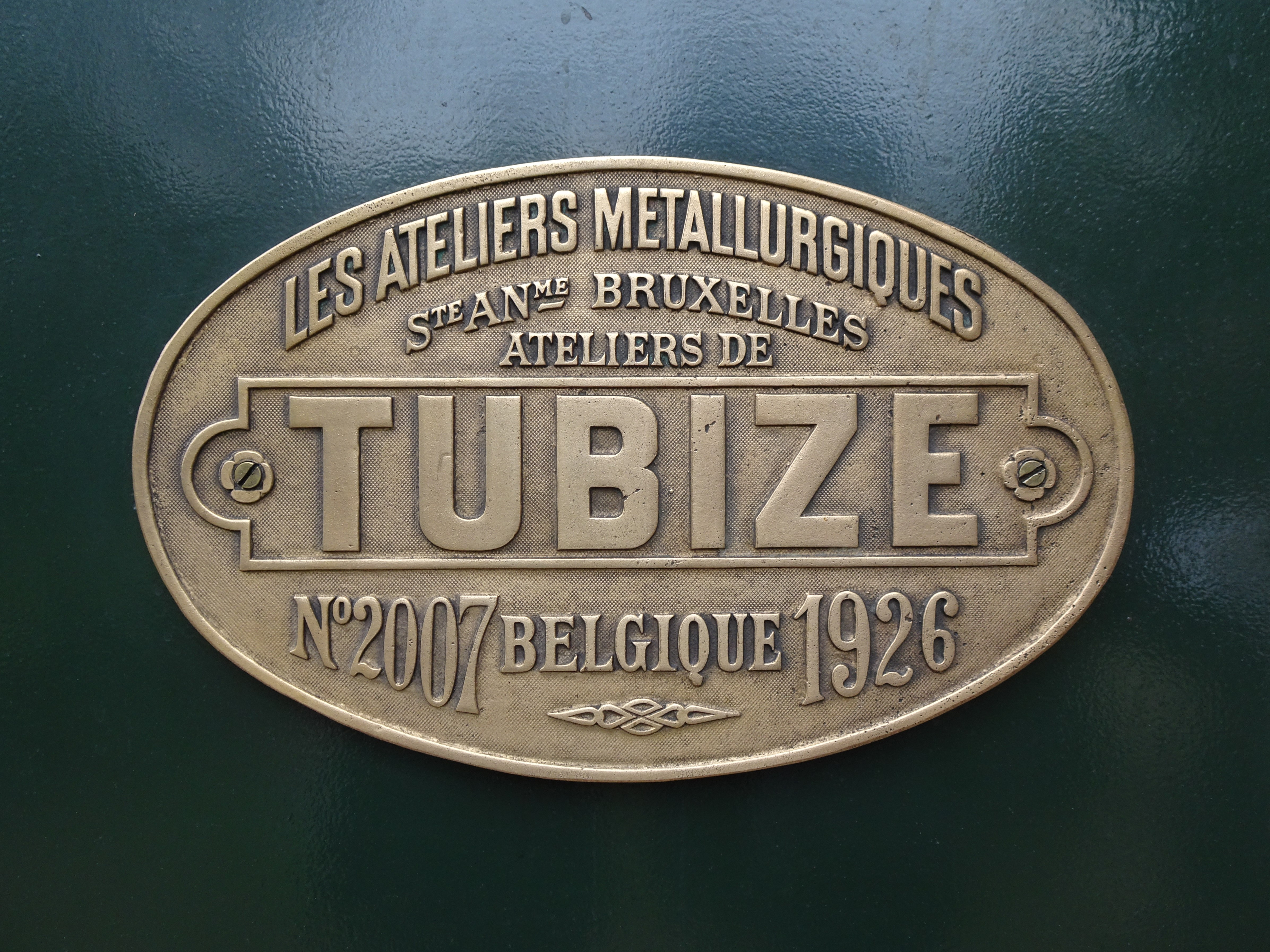 Plaque de constructeur de la locomotive 030T AD05, construite en 1926